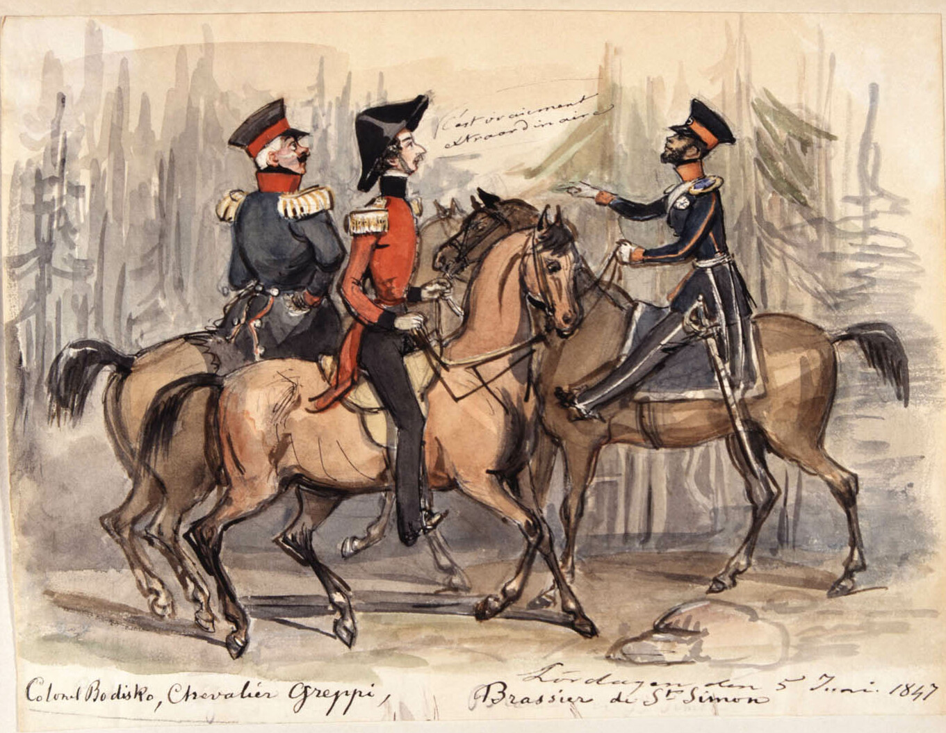 Militärer till häst, lördagen den 5 juni 1847. "Colonel Bodisco, Chevalier Greppi, Brassier de S:t Simon". Akvarell av Fritz von Dardel.